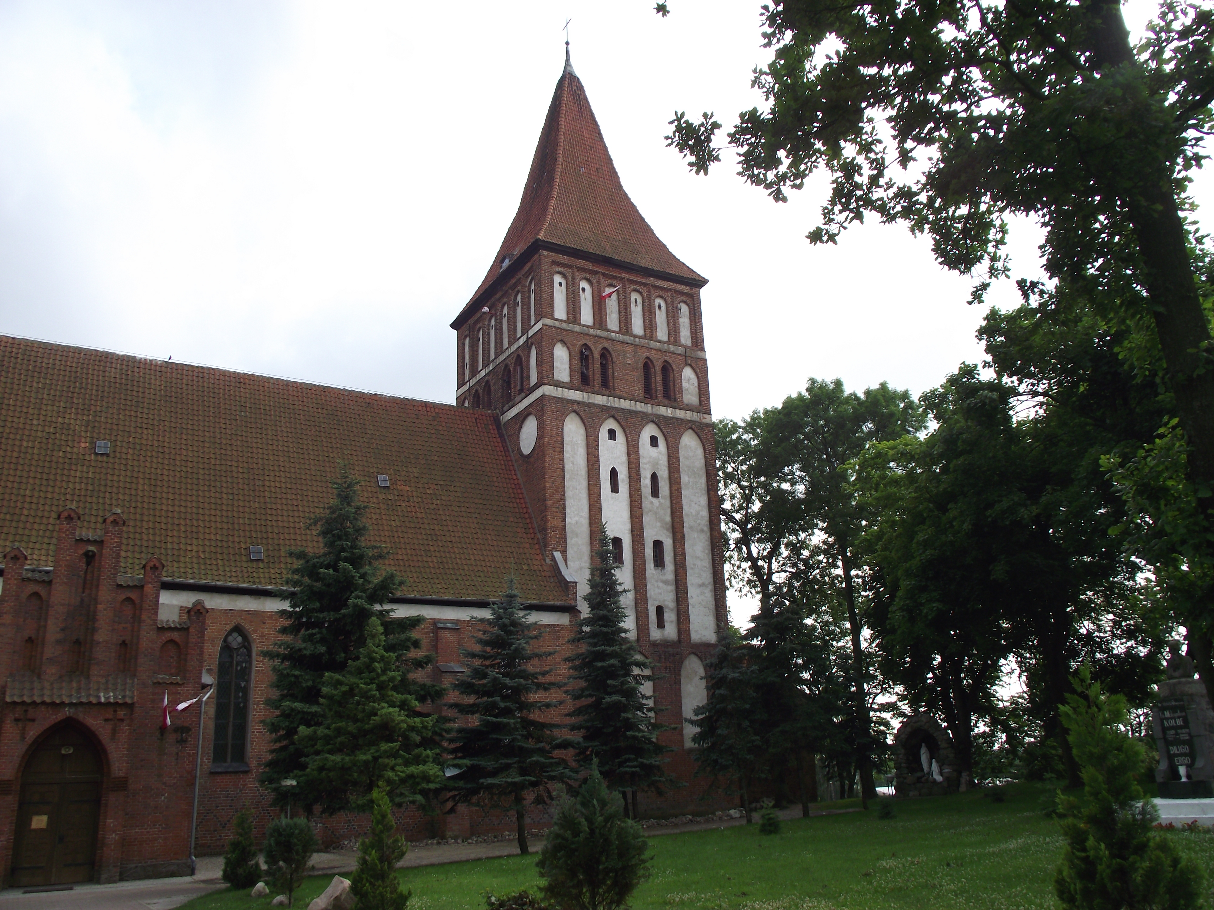 Zalewo - gotycki kościół pw. św. Jana [ XIV w.]